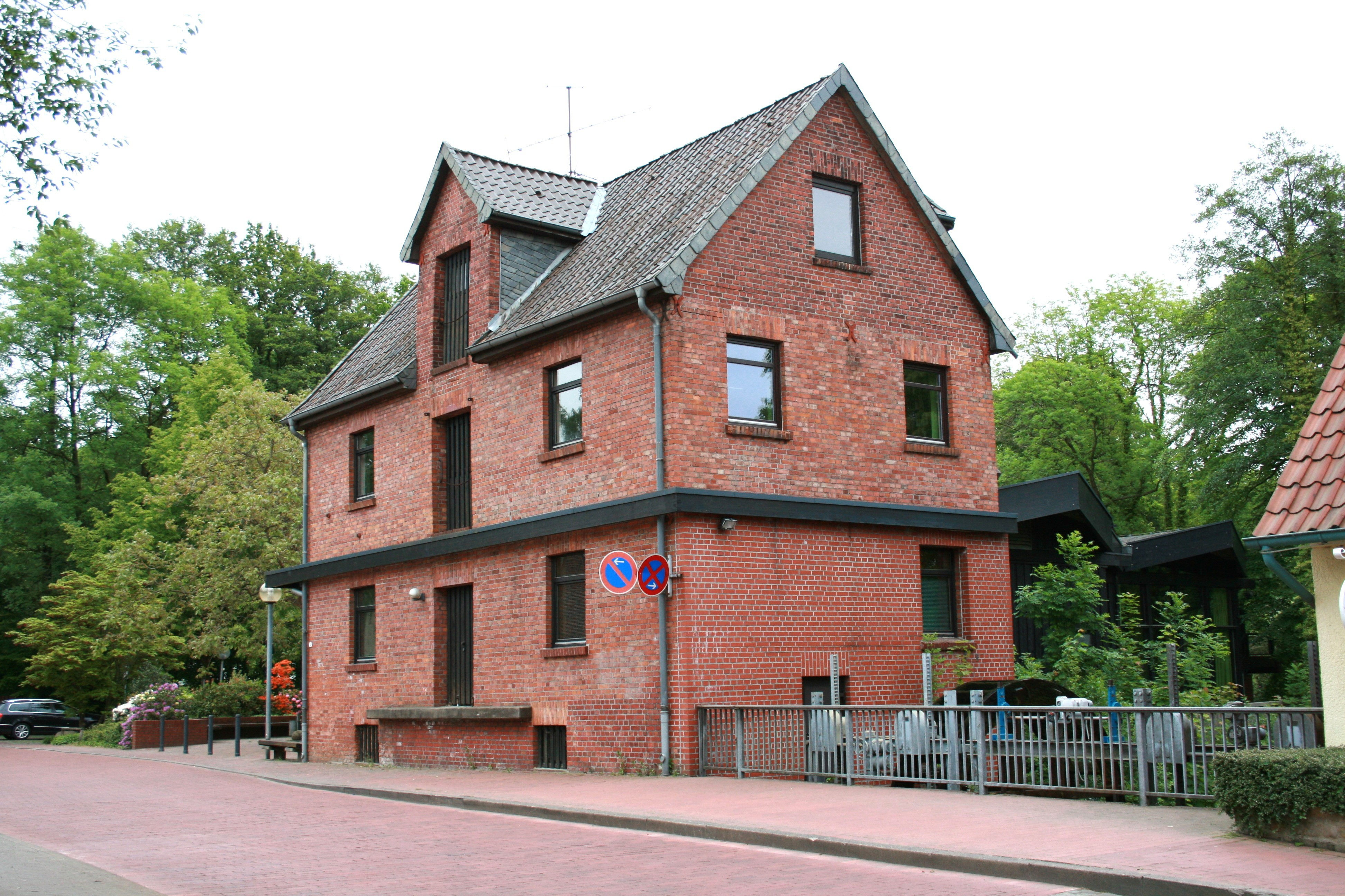 Bibliothek Waldmühle am Mühlenweg in Soltau